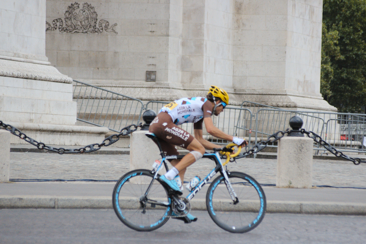 21è étape du Tour de France 2014, Evry-Paris Champs Elysées, photo prise à Paris au pied de l'Arc de Triomphe.